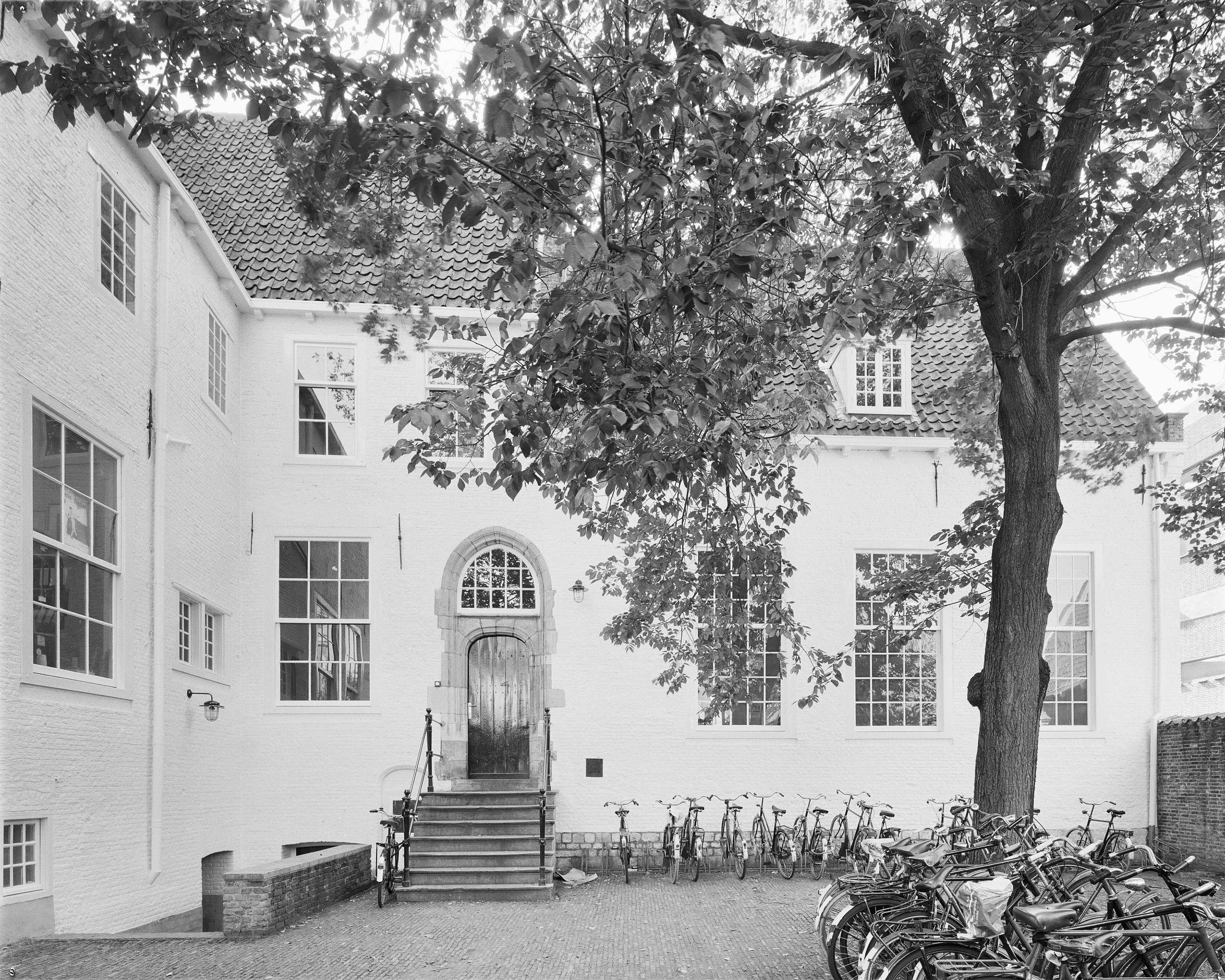 VOORMALIG BARBARAKLOOSTER, SOCIETEIT ALCINK: Exterieur GEVEL BINNENPLAATS